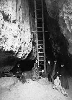 Klufthöhle des Winterstein, um 1886